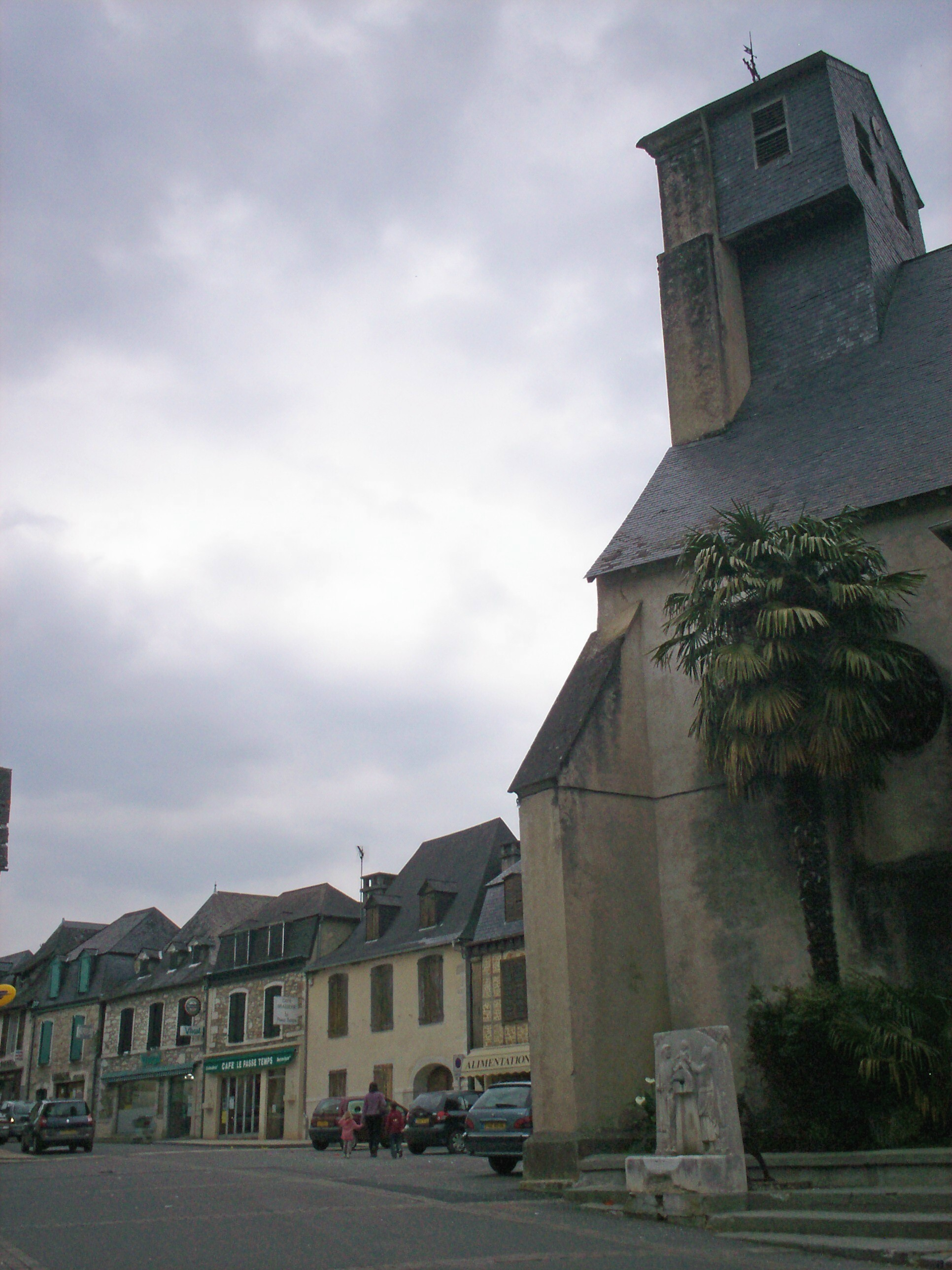 Carrèra, glèisa e hont de La Seuva